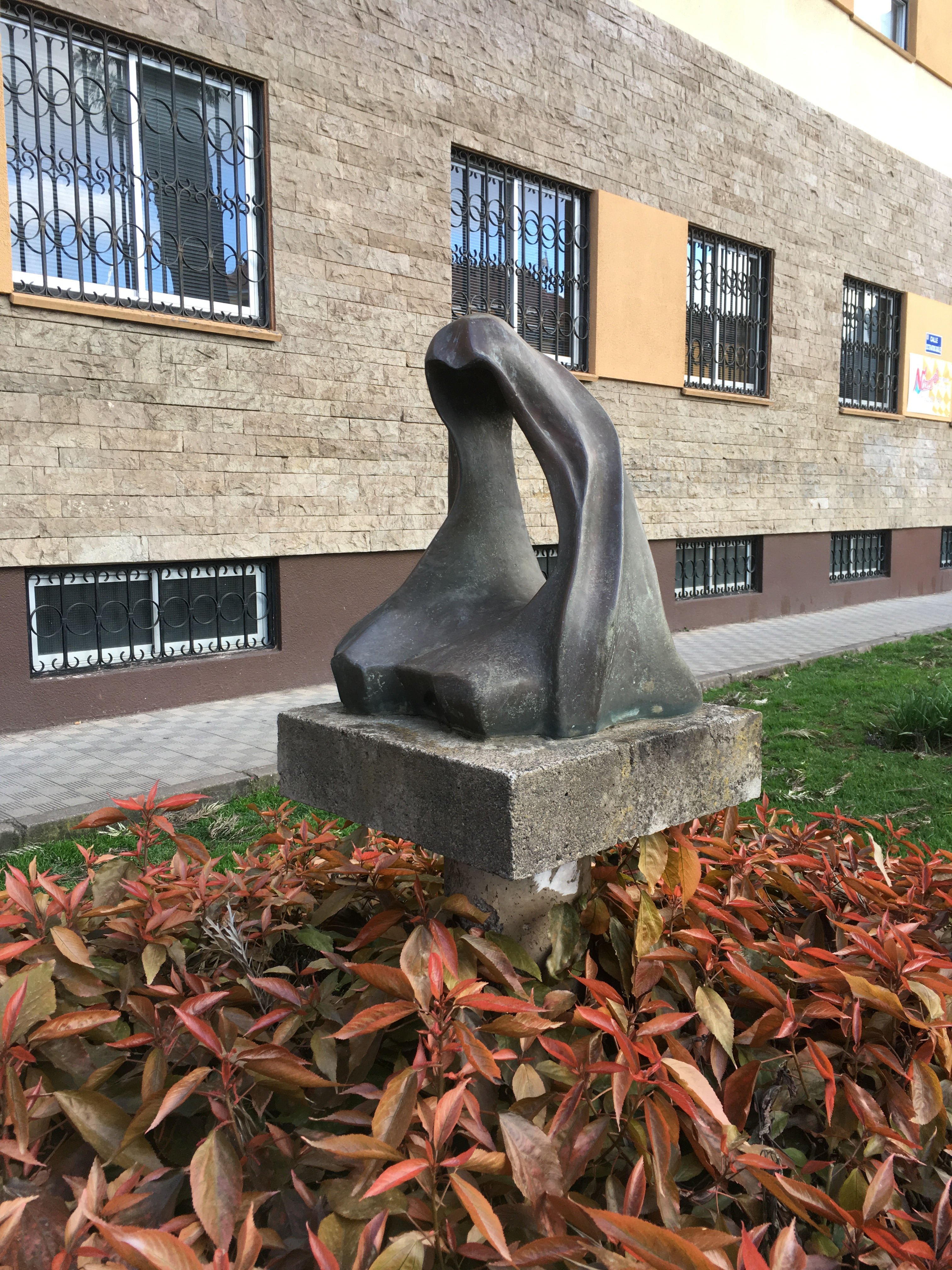 Escultura La dama de Aguere de Fernando Garcíarramos en la ciudad de San Cristóbal de La Laguna (Tenerife)